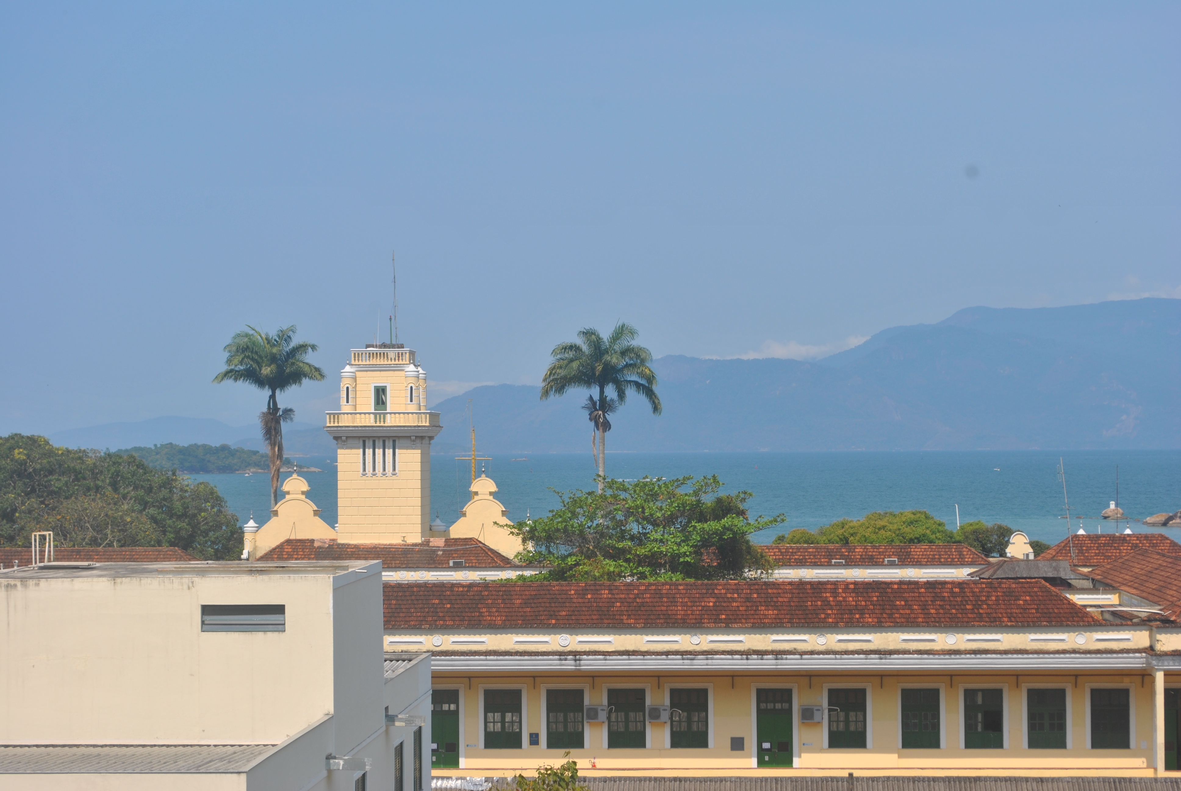 Vista da torre do Colégio Naval para a enseada Batista das Neves.